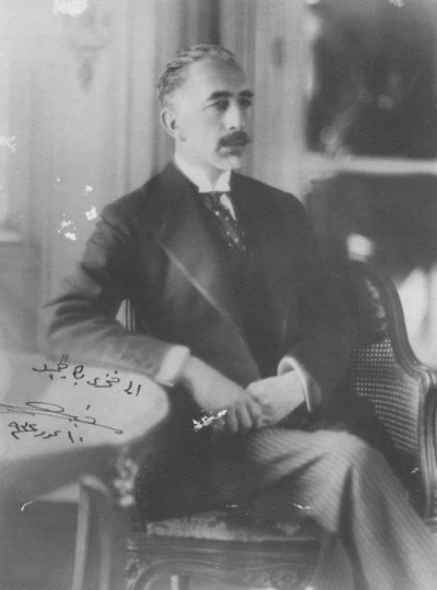 King Faisal I